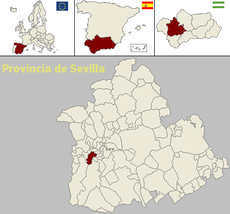 Mapa de localización del municipio sevillano de Bollullos de la Mitación (Andalucía, España)